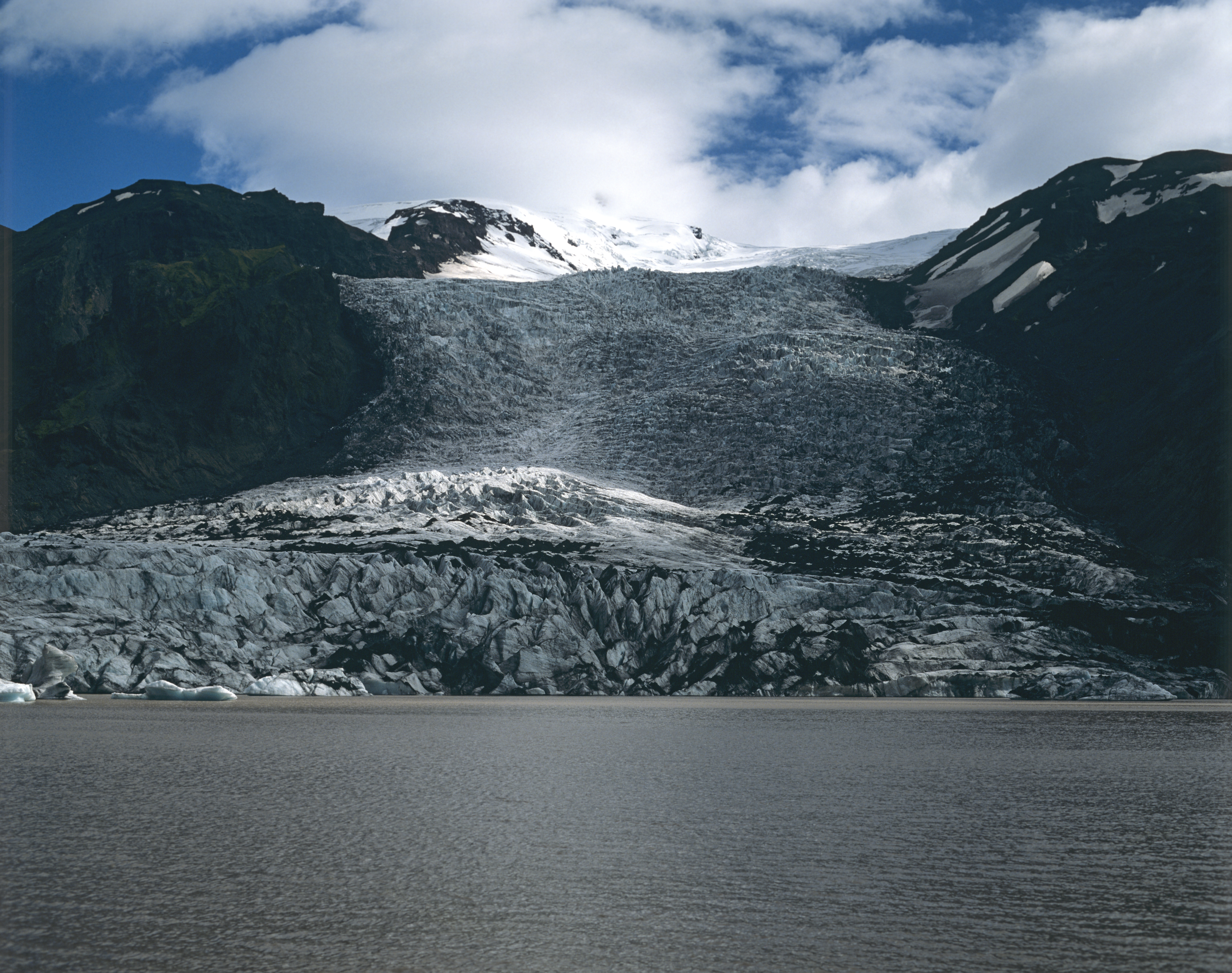 Gígjökull